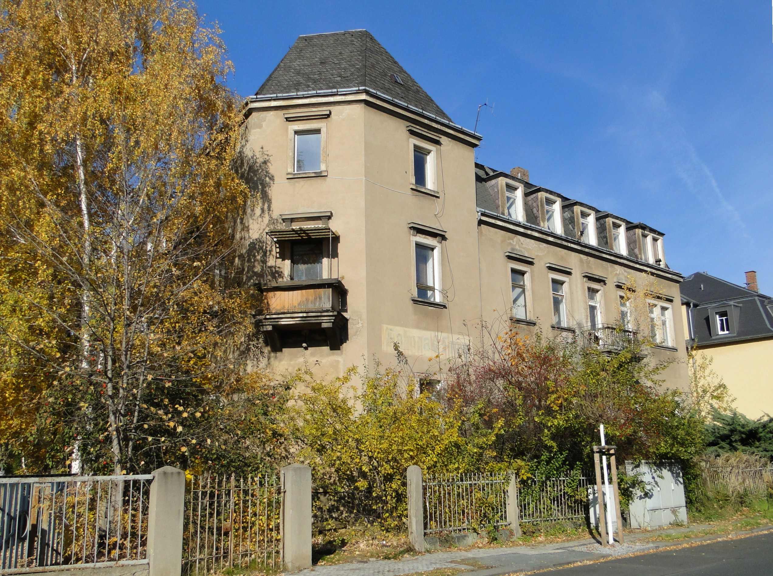 Das ehemalige Kino Leubener Lichtspiele in Dresden-Leuben, Zustand 2010